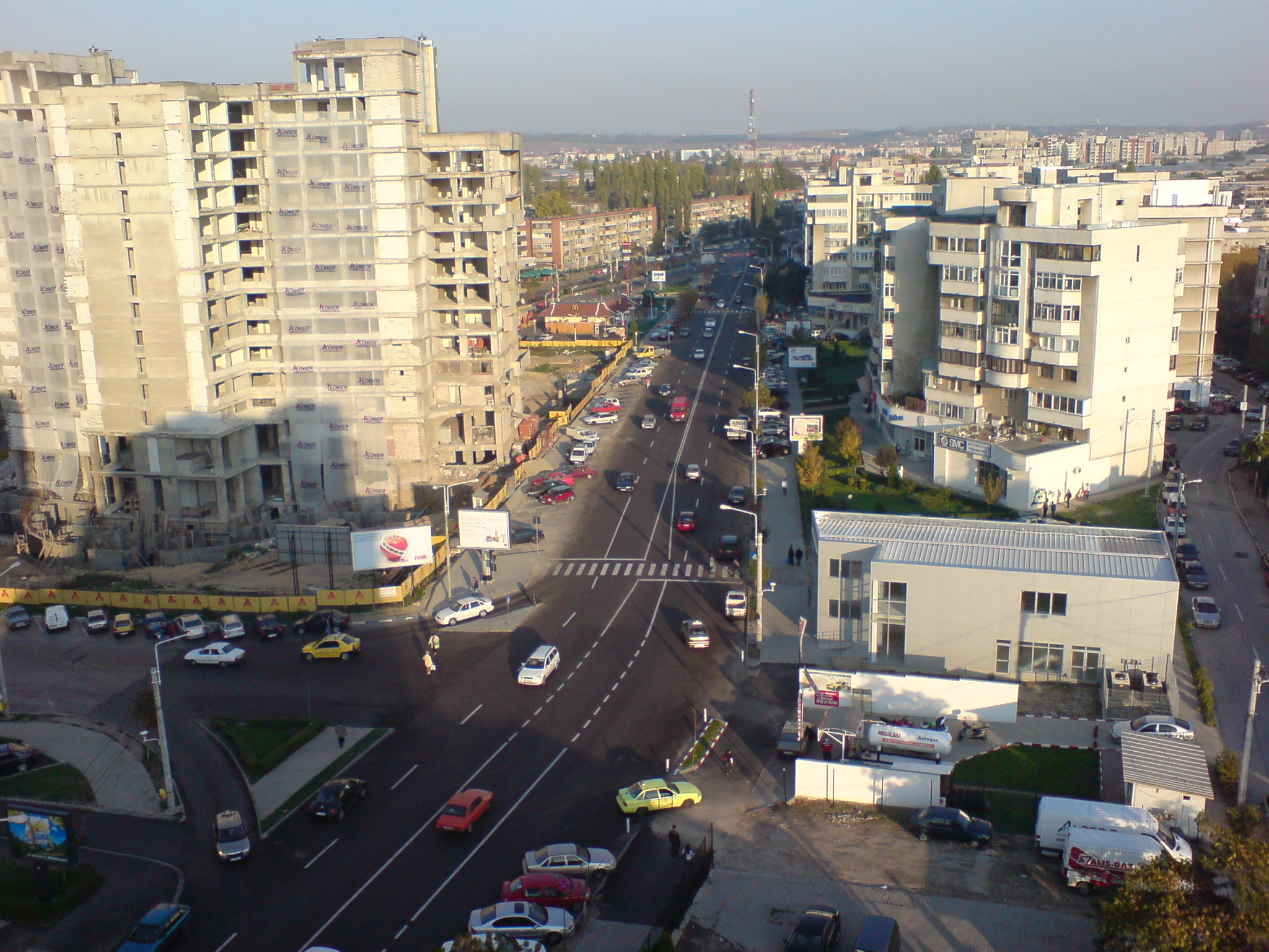 Craiova_K-X-T-2